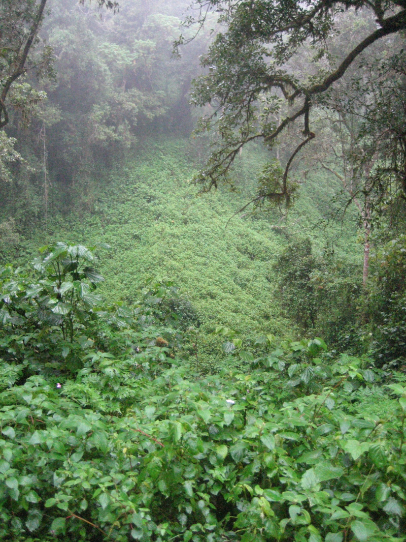 Kilimanjaro